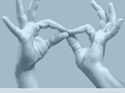 Signe "interprète" en langue des signes québécoise (LSQ) ou en American Sign Language (ASL). Réalisé par Danielle-Claude Bélanger. Interprète français/LSQ. Montréal, Québec.